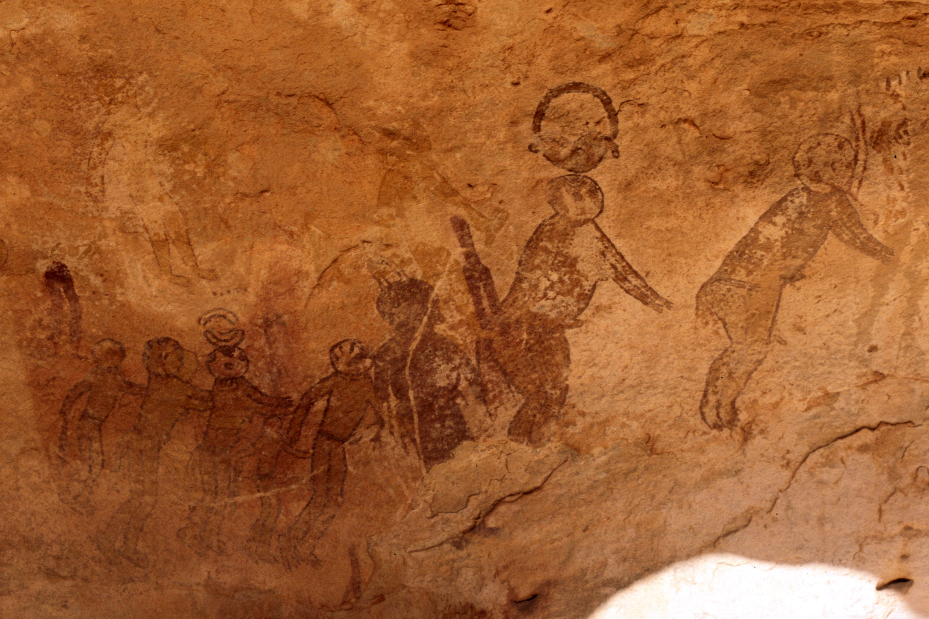 Algerien_5_0036